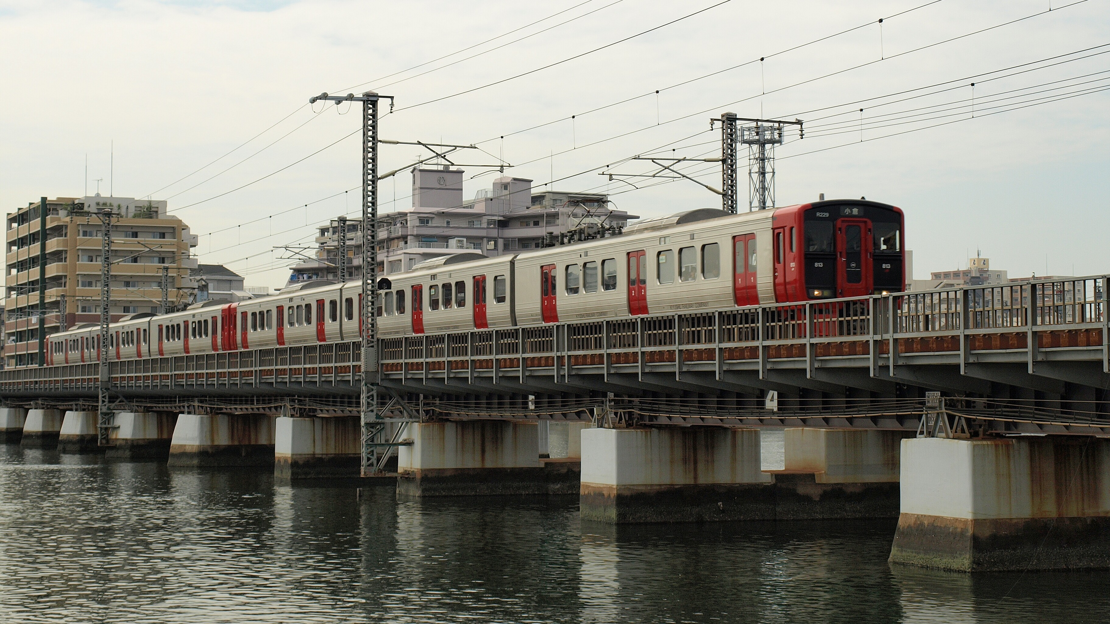 福岡県を流れる多々良川に架かるJR鹿児島線の鉄橋と普通電車。